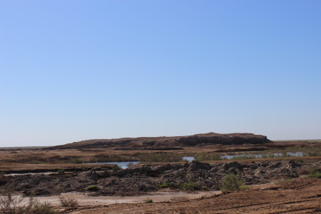 موقع تل "الهفة" التاريخي الذي يعود إلى عصر مملكة هيفاء قبل آلاف السنين.